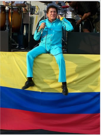 es una foto de un concierto en el cual se celebraba la independencia de colombia